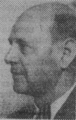 Arkitekten Hugo Jonsson